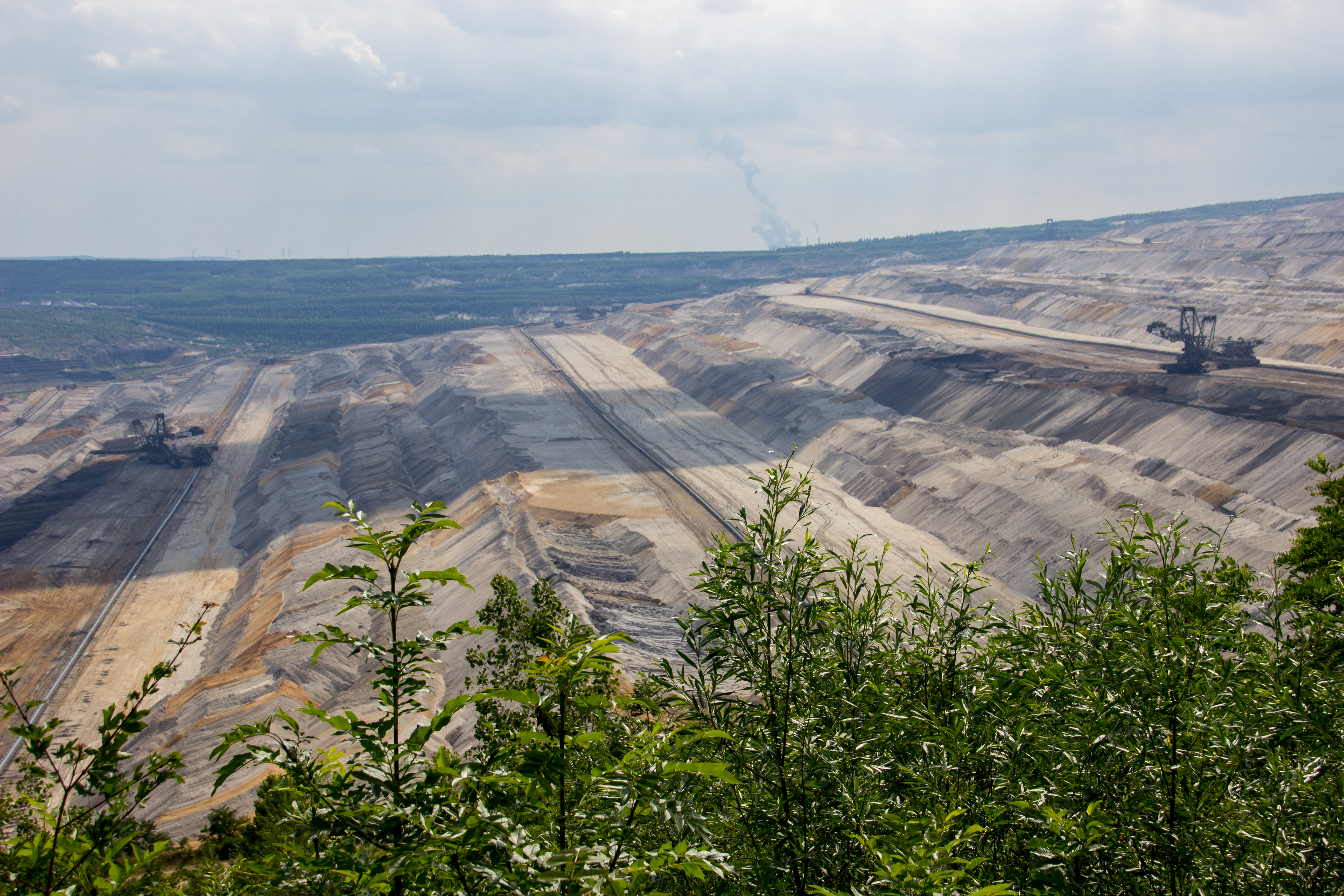 Tagebau Hambach, Elsdorf, Rhein-Erft-Kreis, Nordrhein-Westfalen, Deutschland. Aufgenommen wurde die Fotografie vom Aussichtspunkt des Hambacher Tagebaus nahe dem Ort Elsdorf.